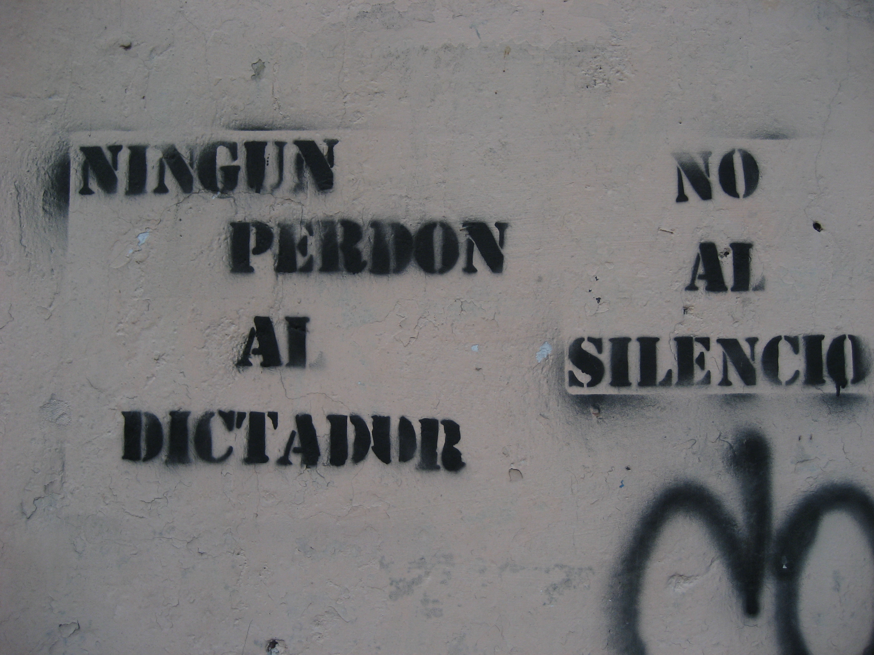 Una muralla de la ciudad de Asunción con un escrito de repudio hacia la dictadura de Alfredo Stroessner (1954 - 1989).